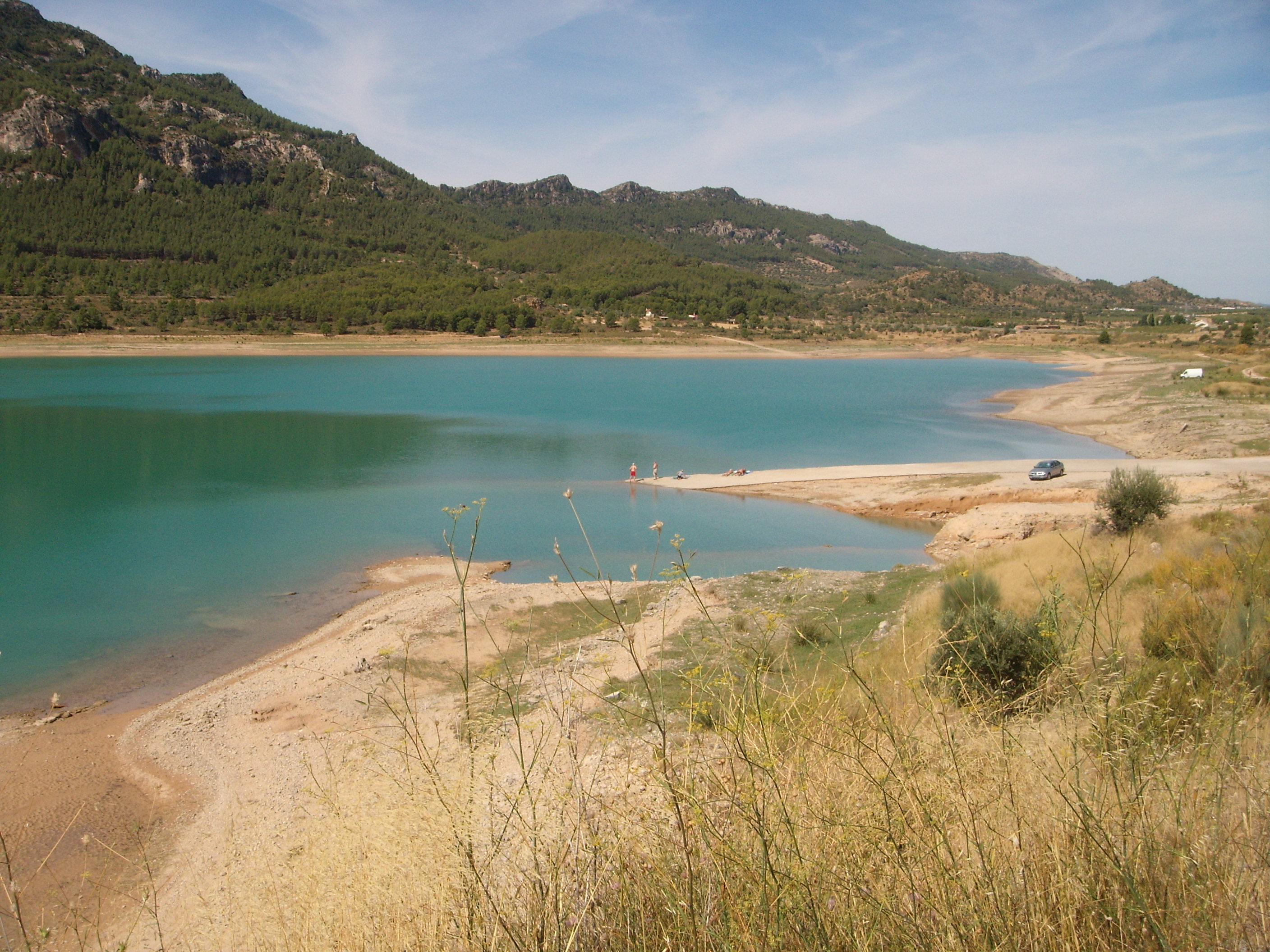 Vista parcial del Embalse de Calanda